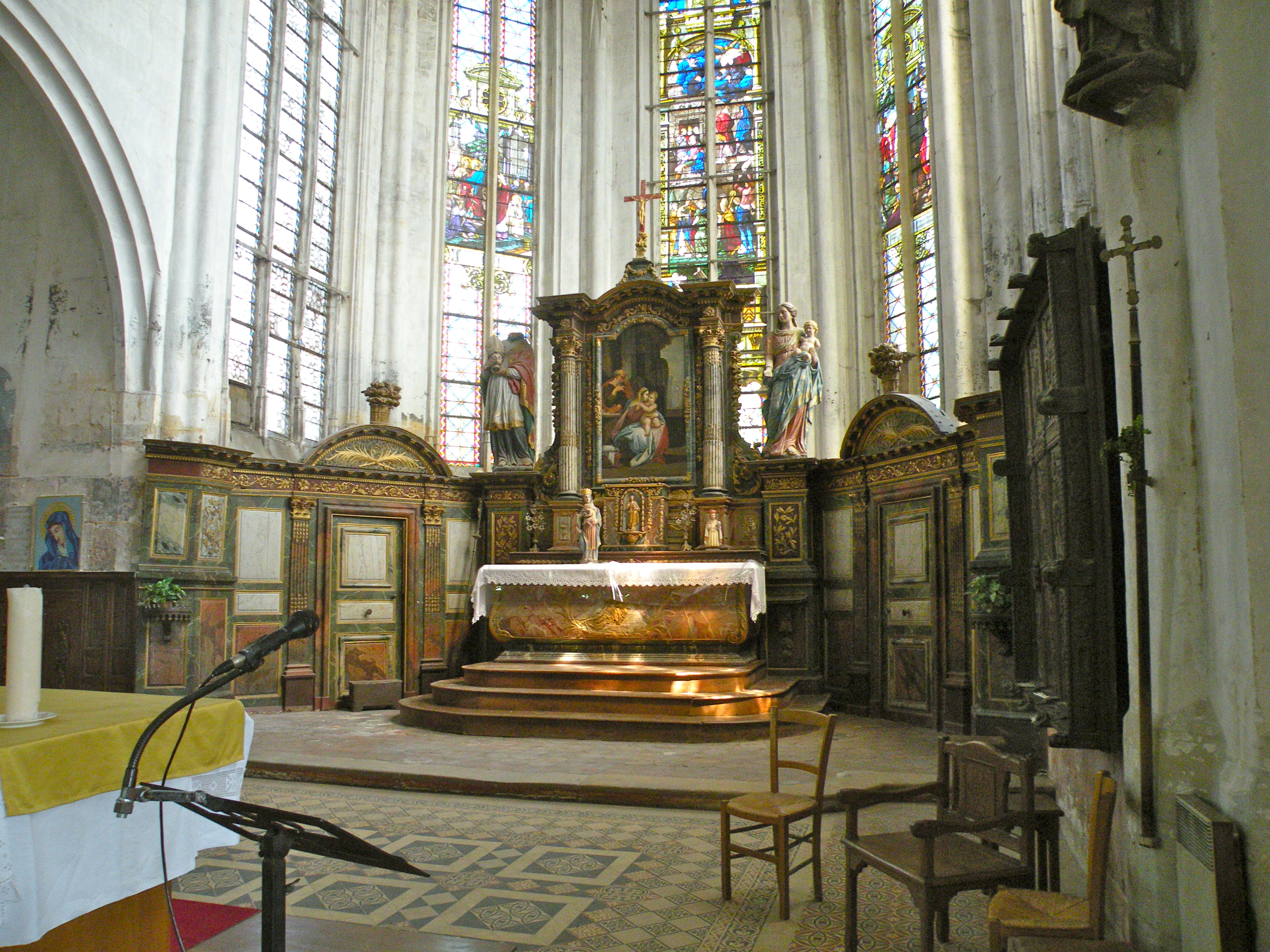 Église Saint-Denis de Sérifontaine autel principal